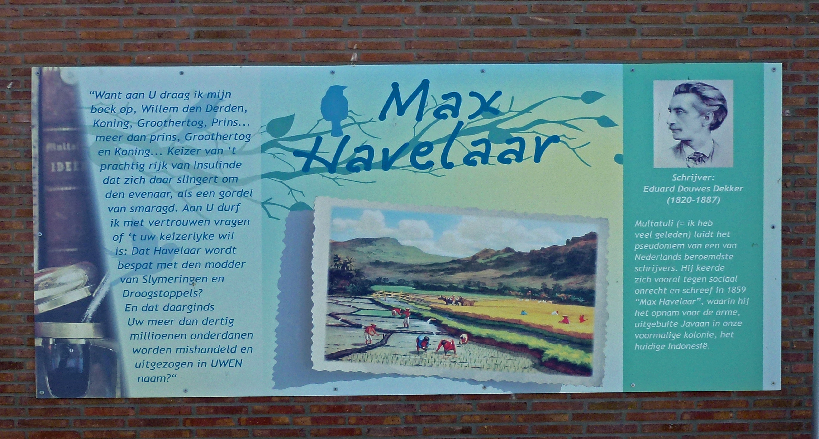 Straatnaam beschrijving. Max Havelaar is geschreven door Eduard Douwes Dekker of Multatuli